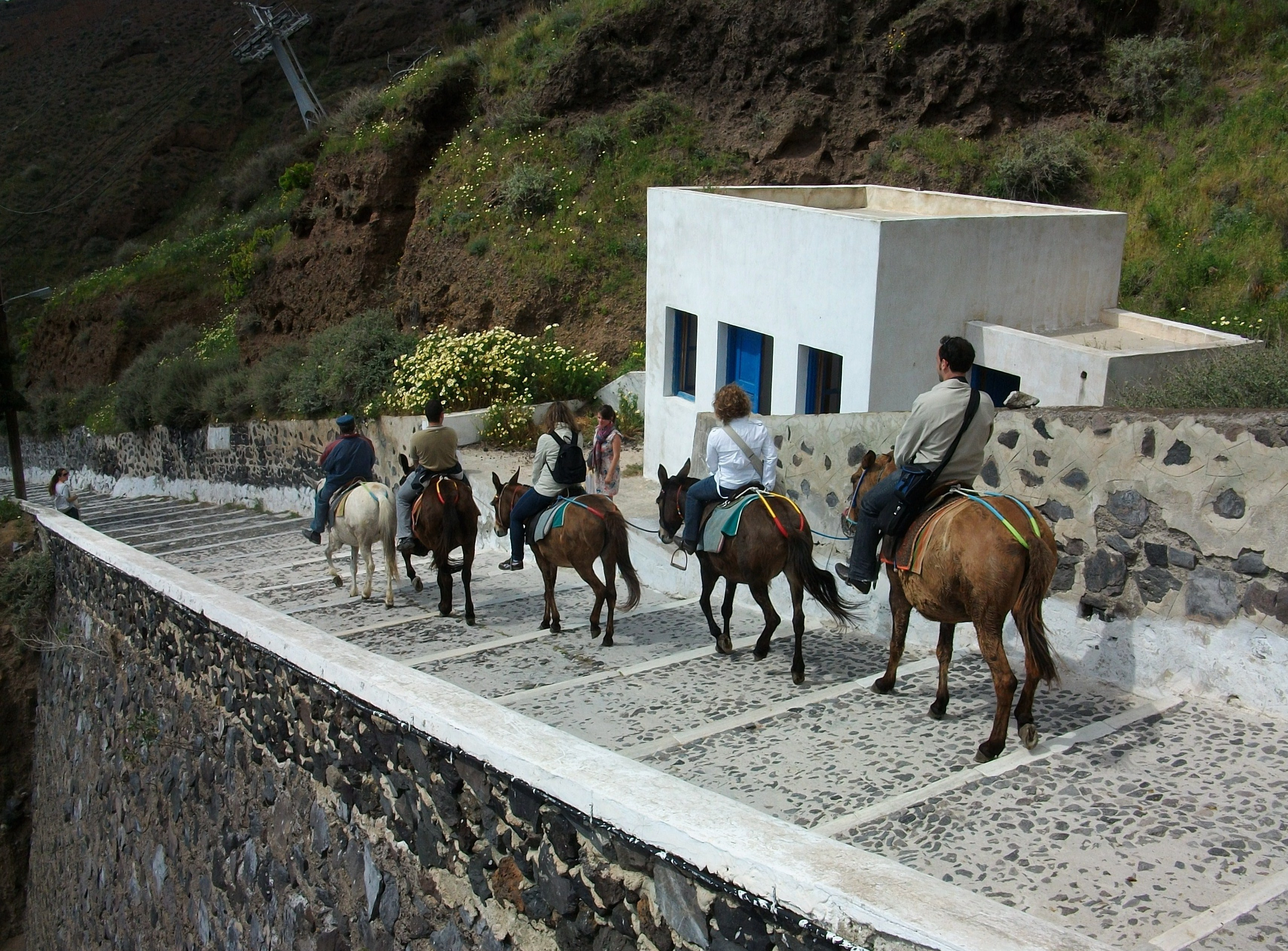 Rucs portant turistes a Santorí.